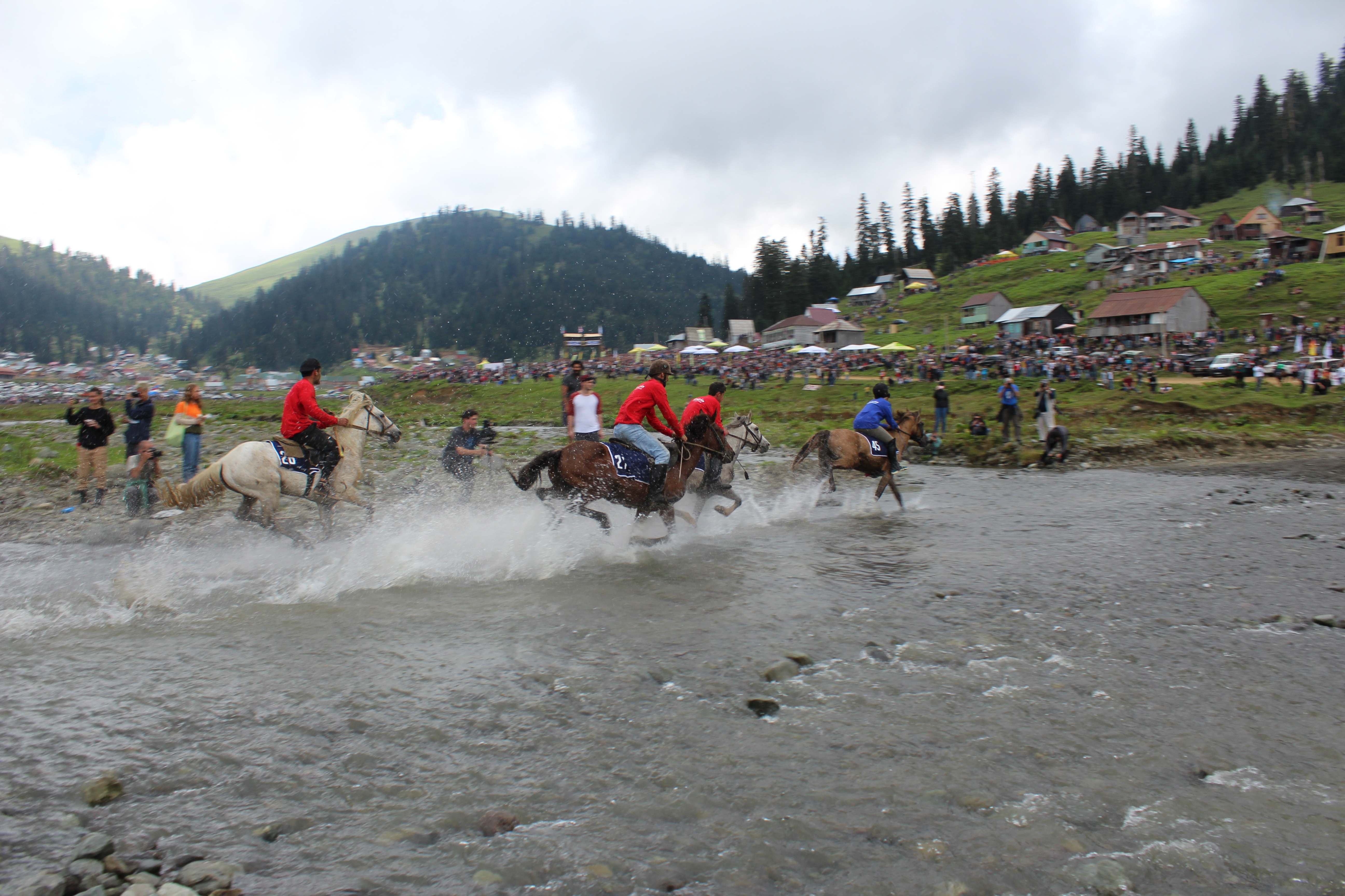 დოღი ბახმაროში